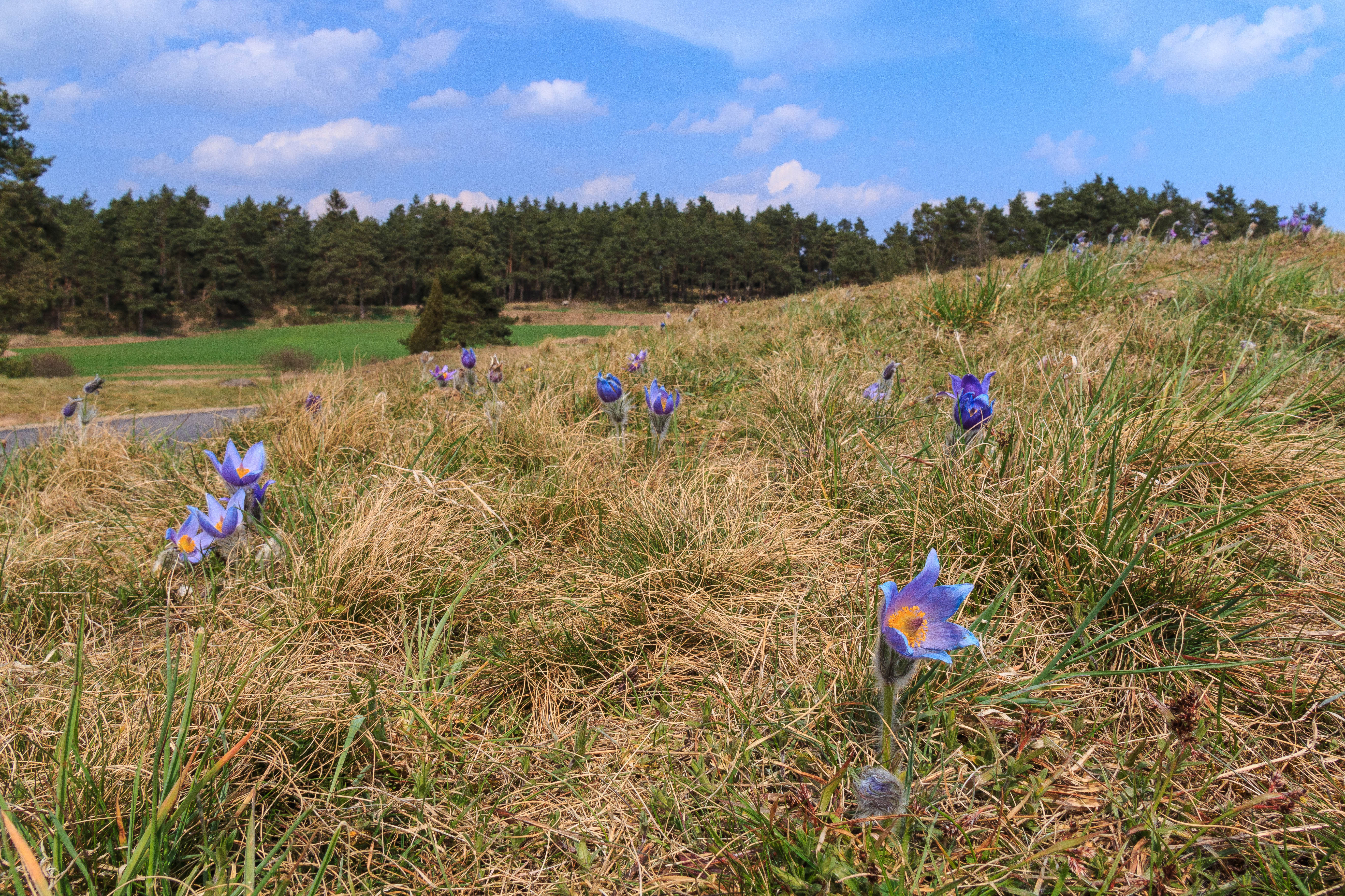 Kvetoucí koniklece v PP Kobylinec Project: Chráněná území